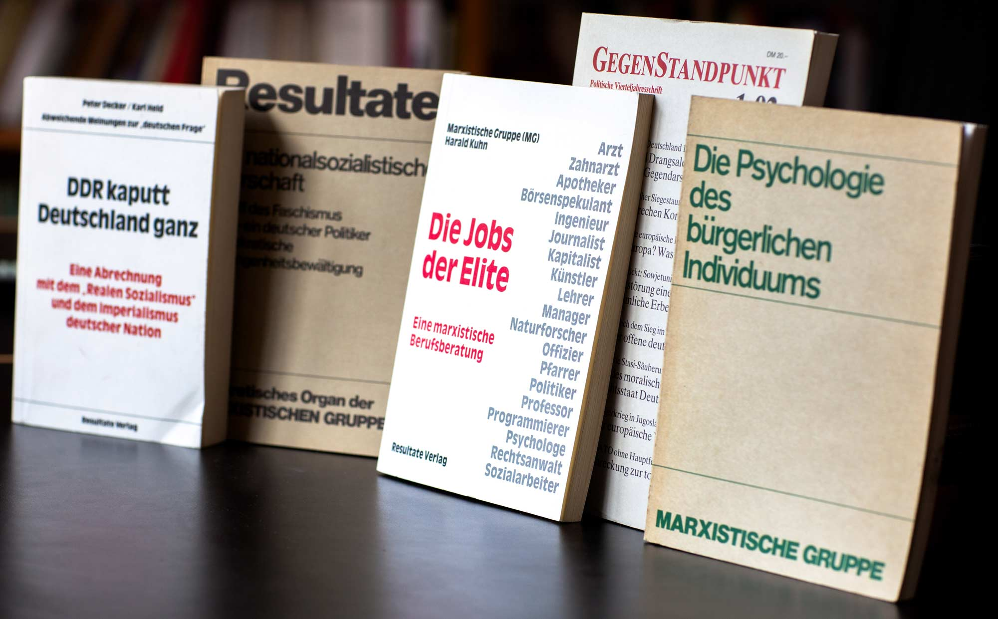 Publikationen der Marxistischen Gruppe (MG) zwischen ca. 1980 und 1990